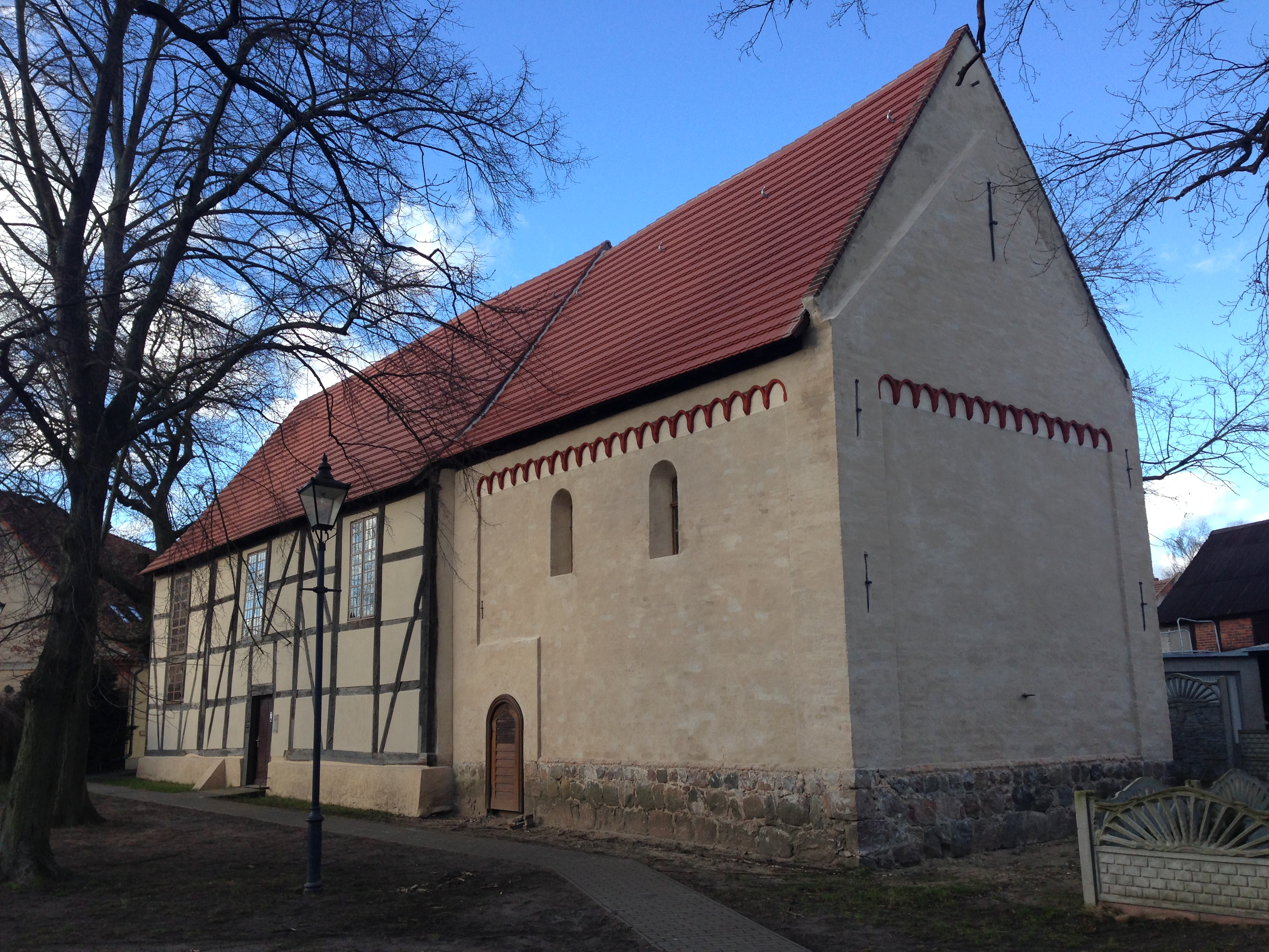 Dorfkirche in Schlagenthin, Ansicht von Südosten, Februar 2014 nach Überarbeitung der baulichen Hülle